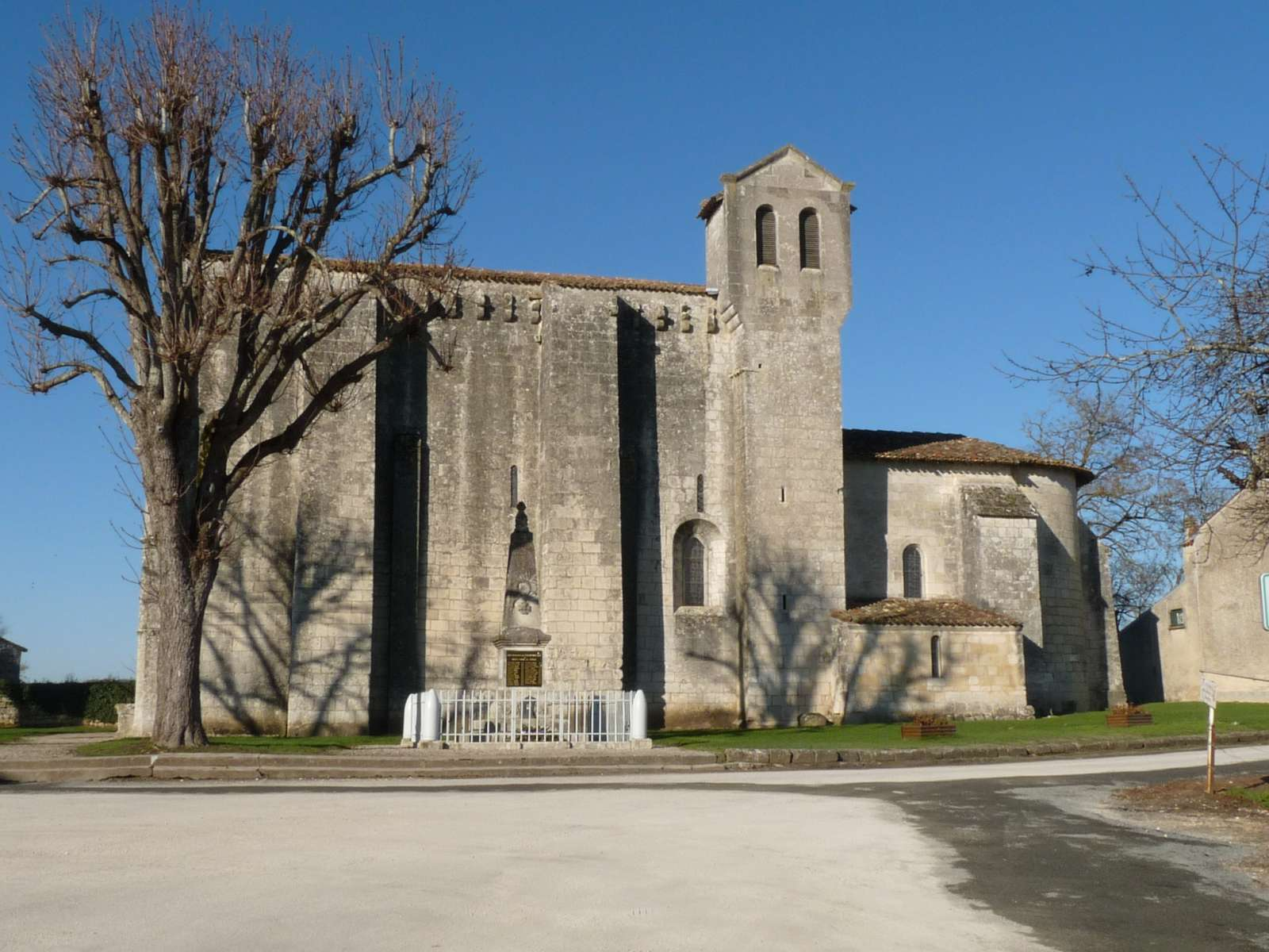 église de Champmillon, Charente, France